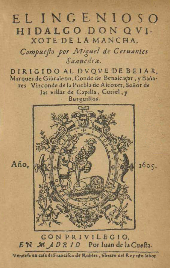 Portada de la primera edición de la primera parte de El ingenioso hidalgo Don Quixote de la Mancha, libro de Miguel de Cervantes. Publicado en Madrid, en 1605, en la imprenta de Juan de la Cuesta. Texto: EL INGENIOSO HIDALGO DON QVIXOTE DE LA MANCHA, Compueſto por Miguel de Ceruantes Saauedra DIRIGIDO AL DVQVE DE BEIAR, Marques de Gibraleon, Conde de Benalcaçar, y Bañares, Vizconde de la Puebla de Alcozer, Señor de las villas de Capilla, Curiel, y Burguillos. Año, 1605. CON PRIVILEGIO, EN MADRID, Por Iuan de la Cueſta. Vendeſe en caſa de Franciſco de Robles, librero del Rey nr̃o. ſeñor. Iconografía: El escudo del impresor muestra un halcón de cetrería, un león dormido y la divisa «Post tenebras spero lucem» (Espero la luz después de las tinieblas). [1]